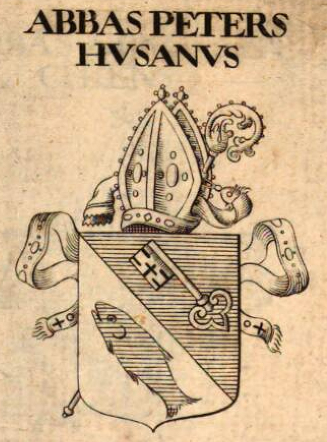 'Wappenbuch. 2. Circulus Suevicus. Schmuck, Strassburg c. 1680. Wappen Abt von Petershausen